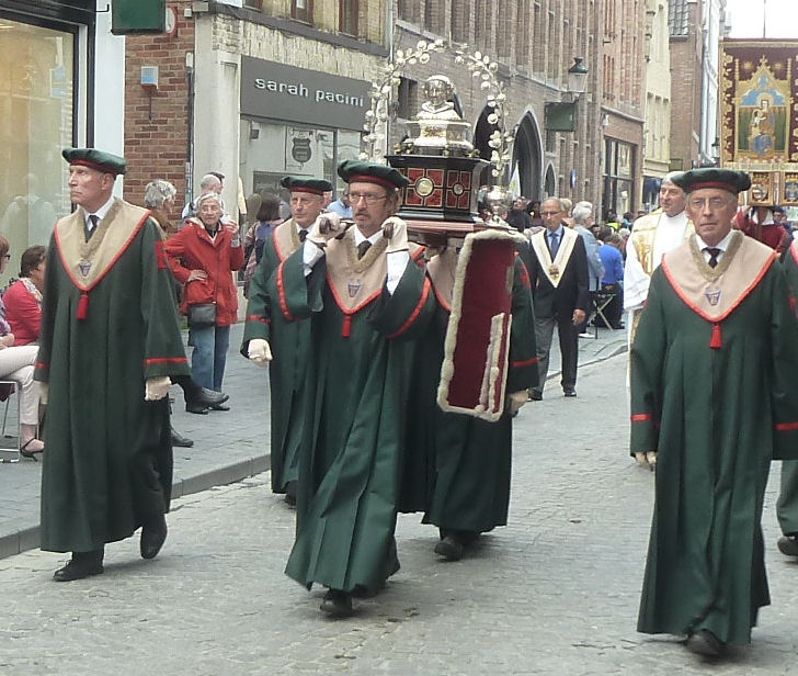 Procesion Holy Blood, Confrerie van Onze-Lieve-Vrouw-van-de-Potterie